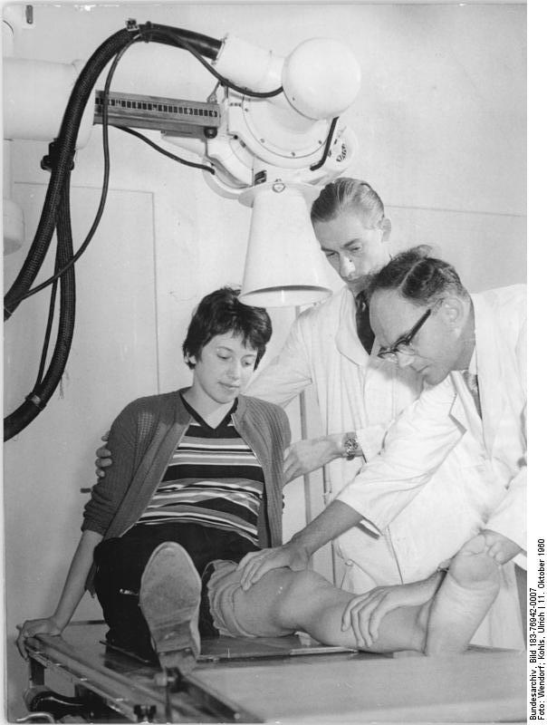 Leipzig, DHfK, Sportarzt, Röntgen Zentralbild Wendorf, Kohls Sd-Fr 11.10.1960 10 Jahre Deutsche Hochschule für Körperkultur in Leipzig. Die Deutsche Hochschule für Körperkultur, die im Oktober 1950 gegründet wurde, begeht am 22.10.1960 ihr 10jähriges Bestehen. Mit 80 Studenten und 10 Lehrkräften wurde der Lehrbetrieb aufgenommen. Bereits am 17. Mai 1952 legte der große Förderer des Sports und Erste Sekretär des ZK der SED, Walter Ulbricht, den Grundstein für den Neubau. Heute sind der DHfK eine eigene Arbeiter- und Bauernfakultät, die Forschungsabteilung, die Trainerabteilung und der Sportclub Wissenschaft der DHfK angeschlossen. Zur Zeit studieren etwa 2000 Studenten an der DHfK. Rund 200 hauptamtliche Lehrkräfte sorgen für eine umfassende Ausbildung der Studenten zu Diplom- und Sportlehrer für allgemeinbildende polytechnische Oberschulen. UBz: In der Sportärztlichen Hauptberatungsstelle Leipzig setzen Chefarzt Dr. Horst Burger (rechts) und der medizinisch-technische Assistent Rudolf Ledig die DHfK-Studentin U. Sievert für eine Kniegelenkröntgenaufnahme zurecht.